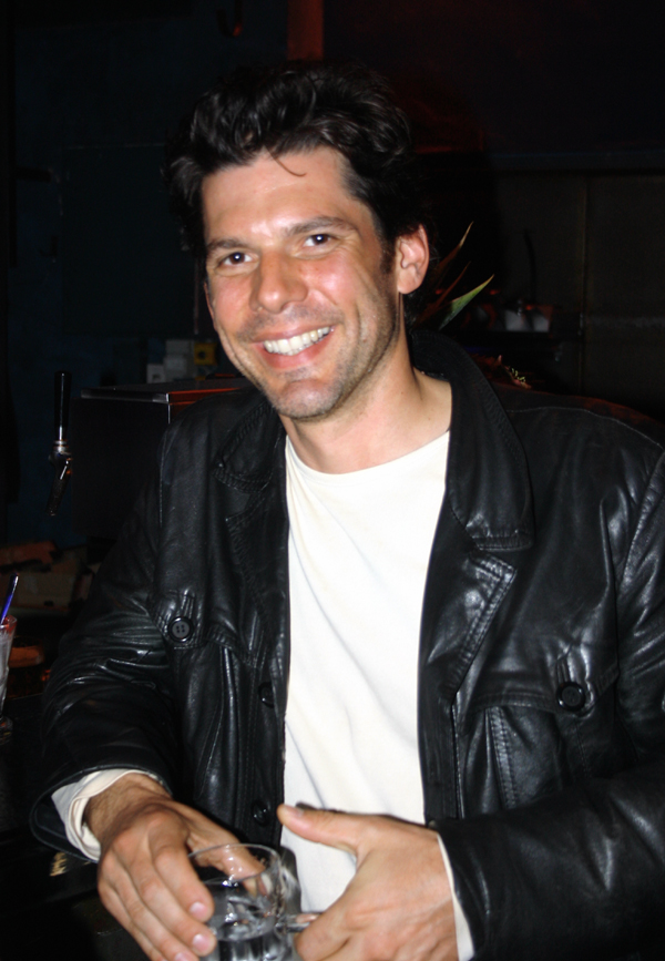 Der Schauspieler Gregory B. Waldis (u. a. "Sturm der Liebe"). Hier im Oktober 2006 in München.